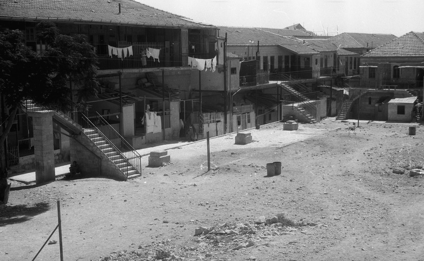 1940 מאה שערים en}|Mea Shearim